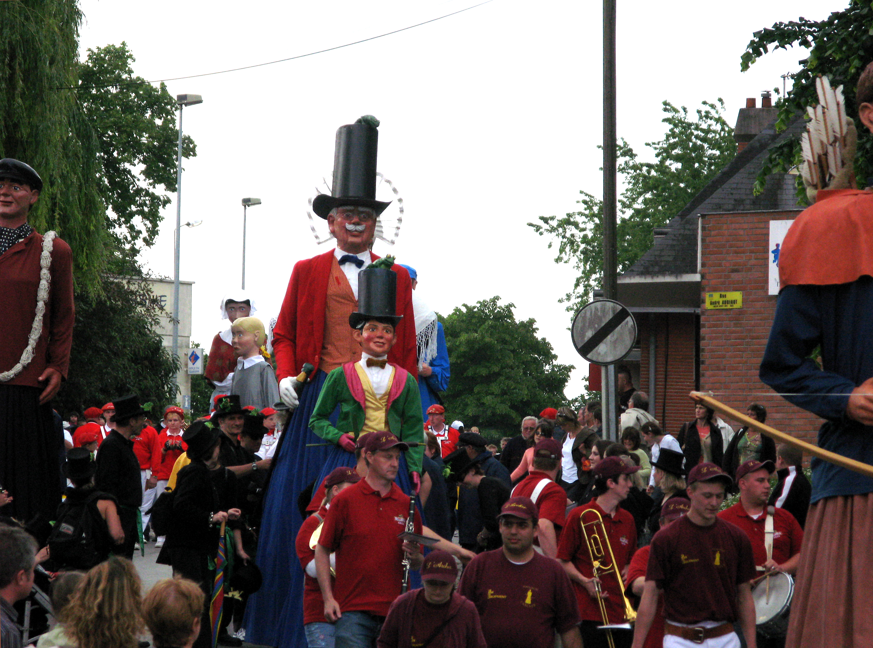 Ham (Somme, France) - Animation festive au centre-ville, un dimanche de printemps. Des géants de procession descendant la rue du Château (rue André Audinot) rejoignent la rue de Noyon, en passant devant la Salle des Fêtes. "L'Archer de Bois-de-Lessines" vient de passer, juste à droite. On ne voit qu'une partie de son arc et ses flèches remplissant son carquois. "Batisse", tout à gauche, n'est vu aussi que très partiellement sur cette photo. "Anatole", le plus petit des 2 géants coiffés d'un haut-de-forme. "Grand-Père Guernouillard", juste derrière. "Dudule", un peu en arrière et à gauche "Armandine"